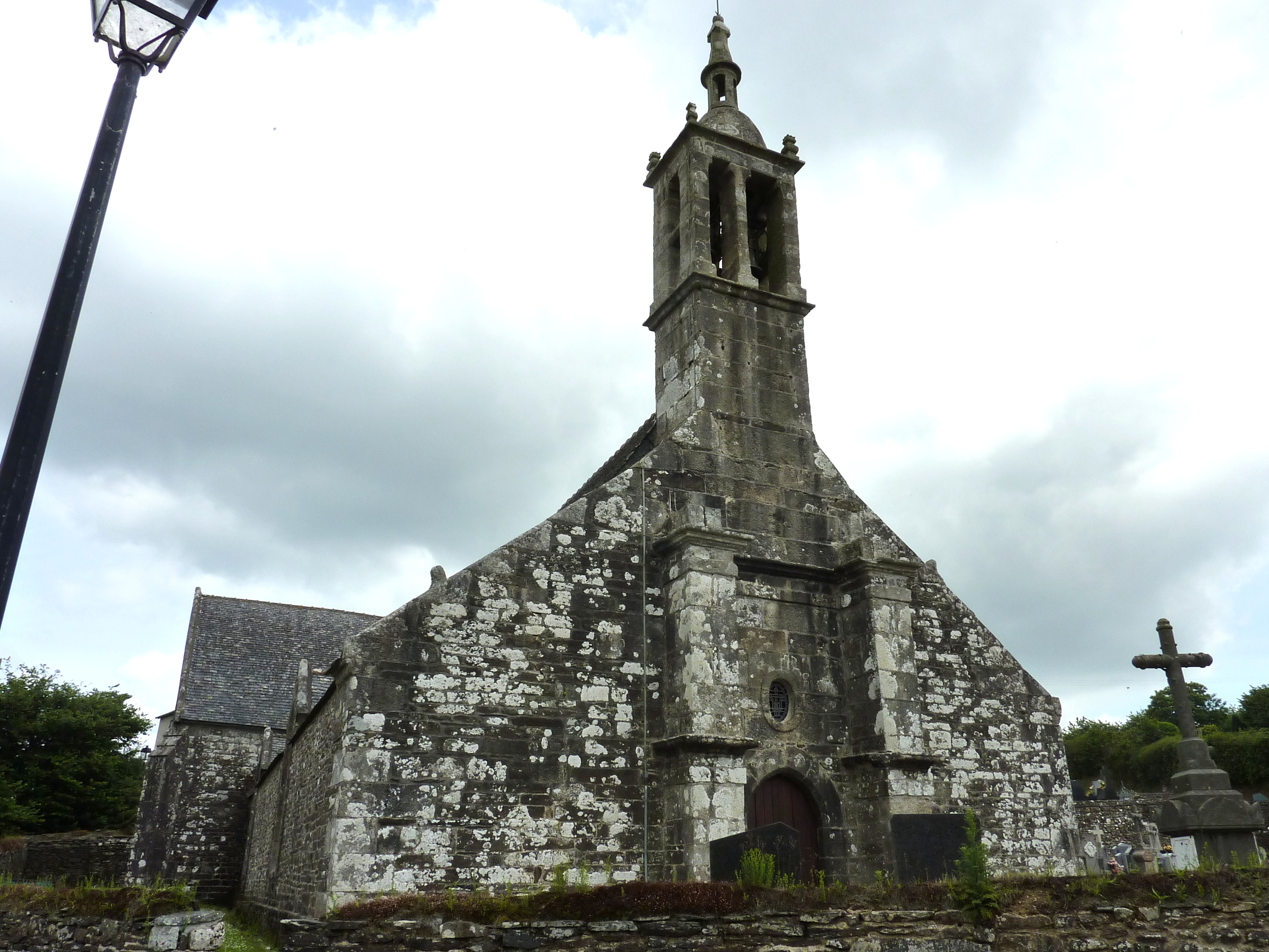 Lannédern: l'église Saint-Edern, vue de l'ouest